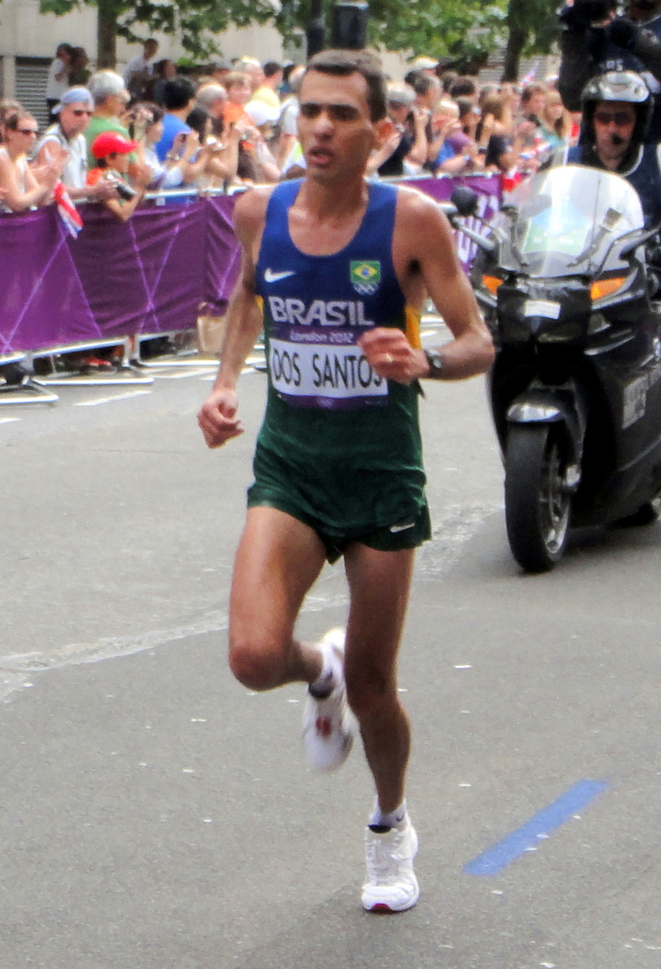 Marilson dos Santos (Brazil) - London 2012 Men's Marathon